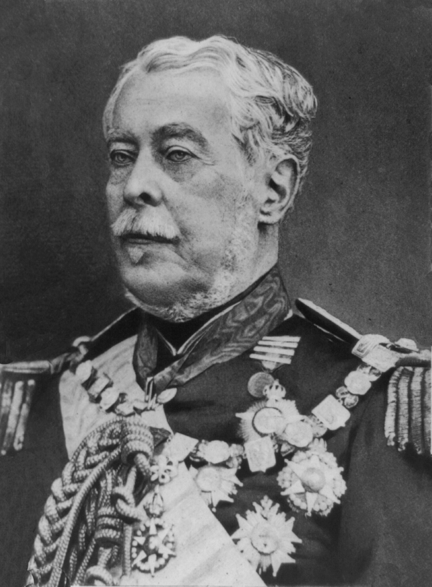 Fotogravura de Luís Alves de Lima e Silva, o duque de Caxias, patrono do Exército Brasileiro.